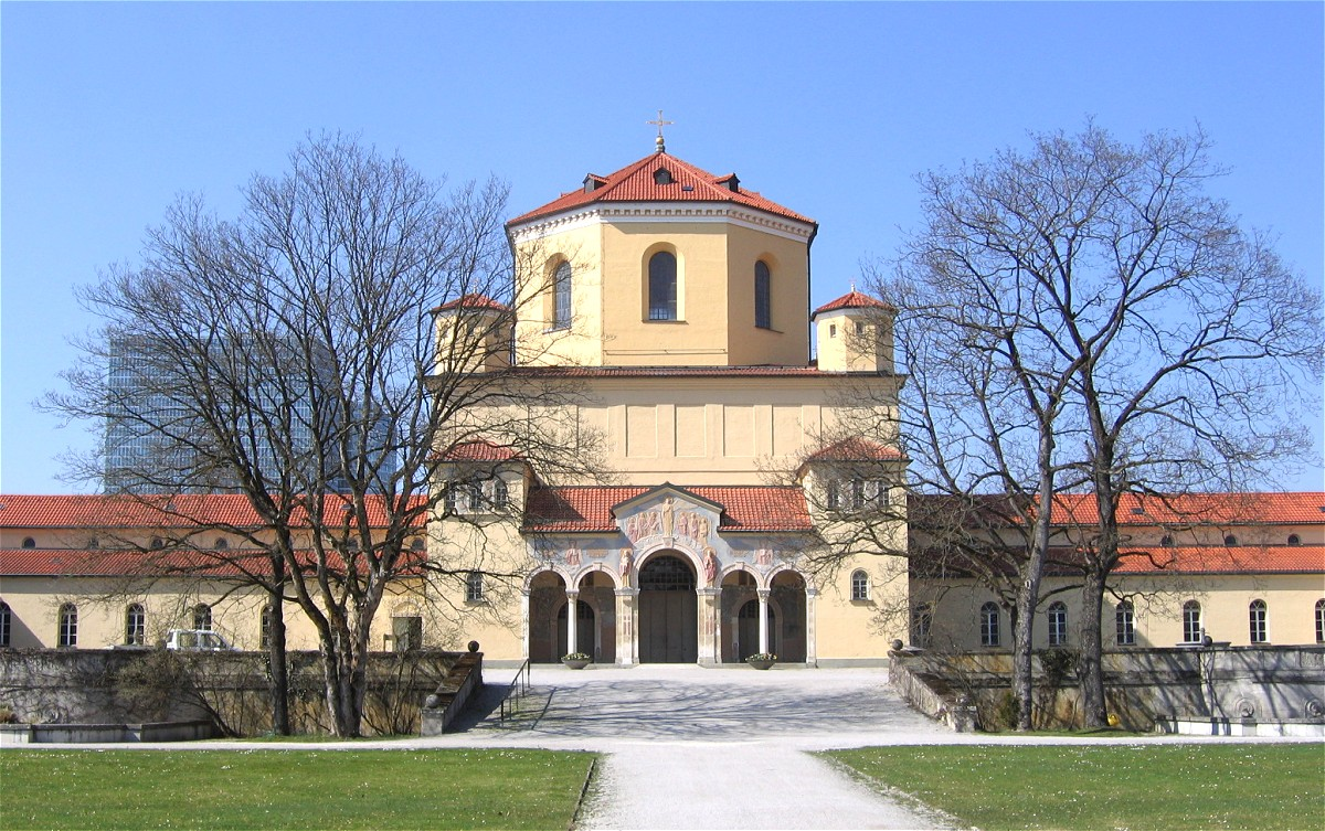 Nordfriedhof, München